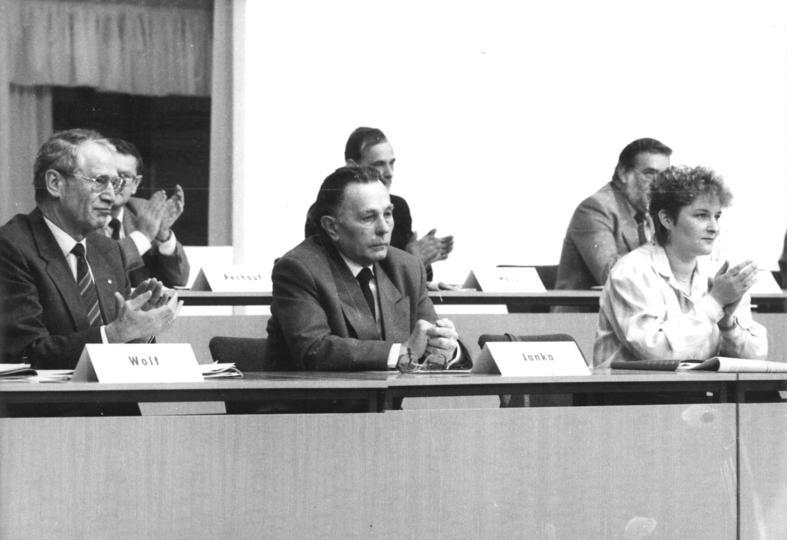 ADN-ZB Senft 16.12.89 Berlin: SED-Parteitag Der außerordentliche Parteitag der SED hat in der Dynamohalle seine am vergangenen Wochenende unterbrochene Beratung fortgesetzt. Im Präsidium nahm auch Walter Janka (Mitte) Platz.